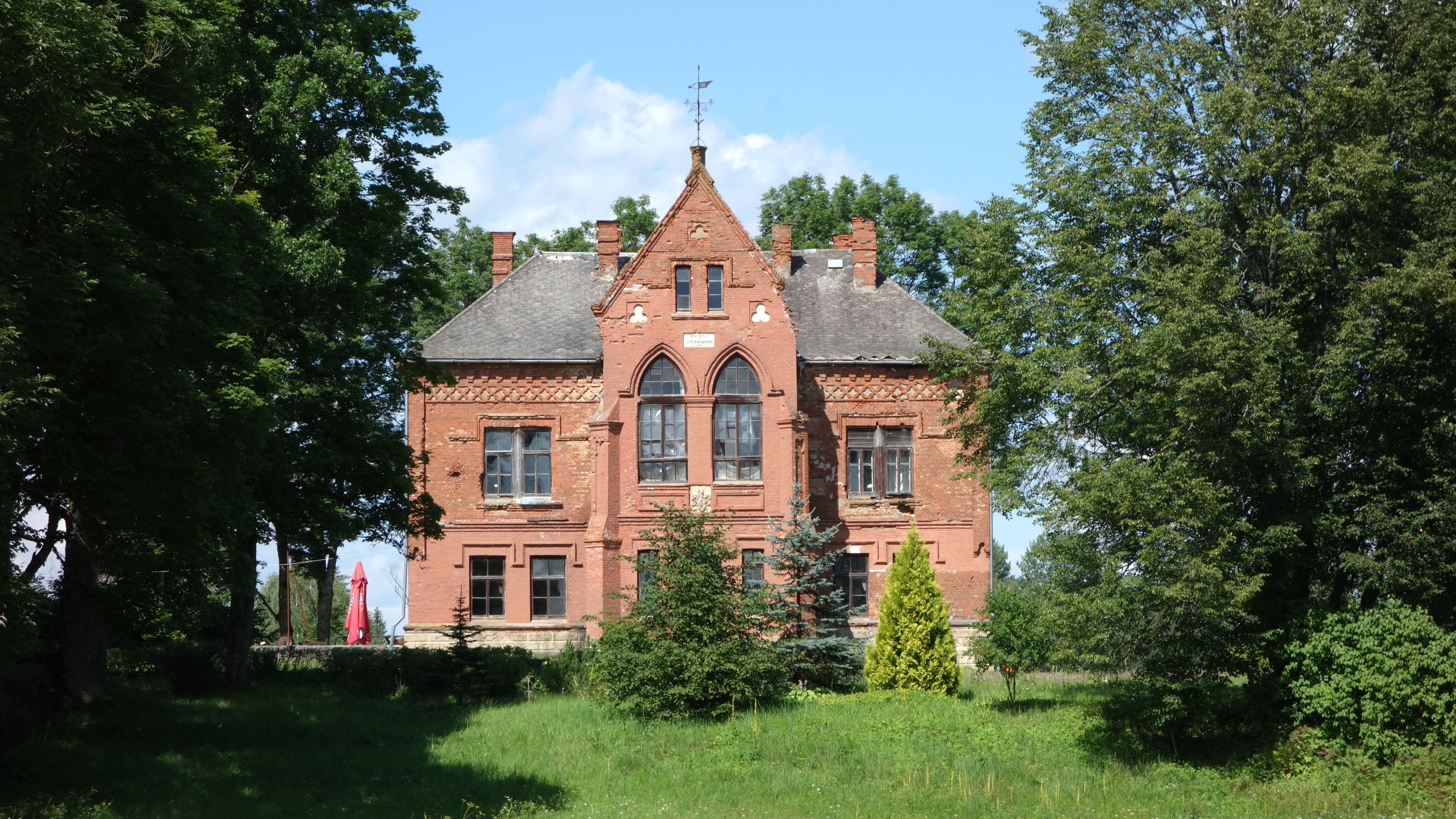 Cirsti mõisa peahoone 2015. aastal.